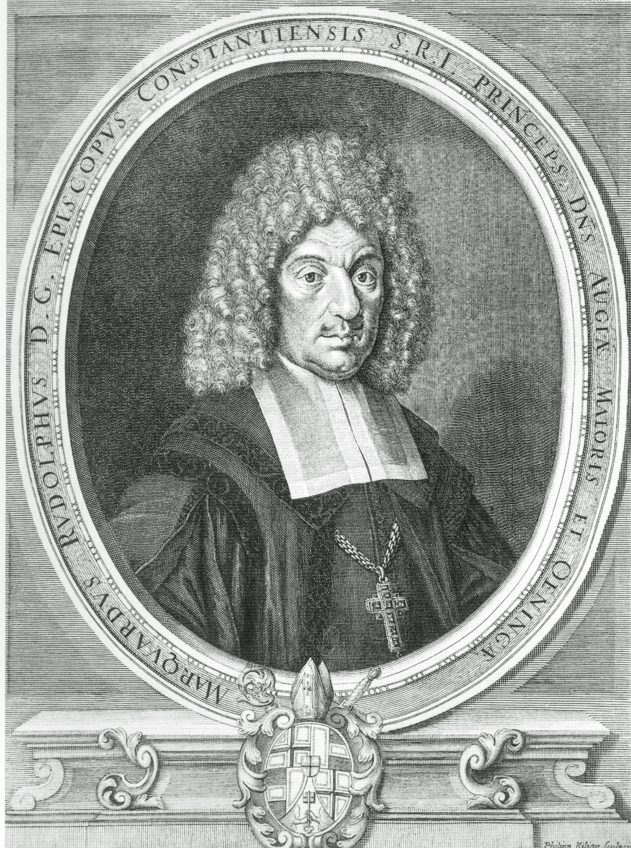 Marquard Rudolf von Rodt Fürstbischof von Konstanz (1689 – 1704) Kupferstich